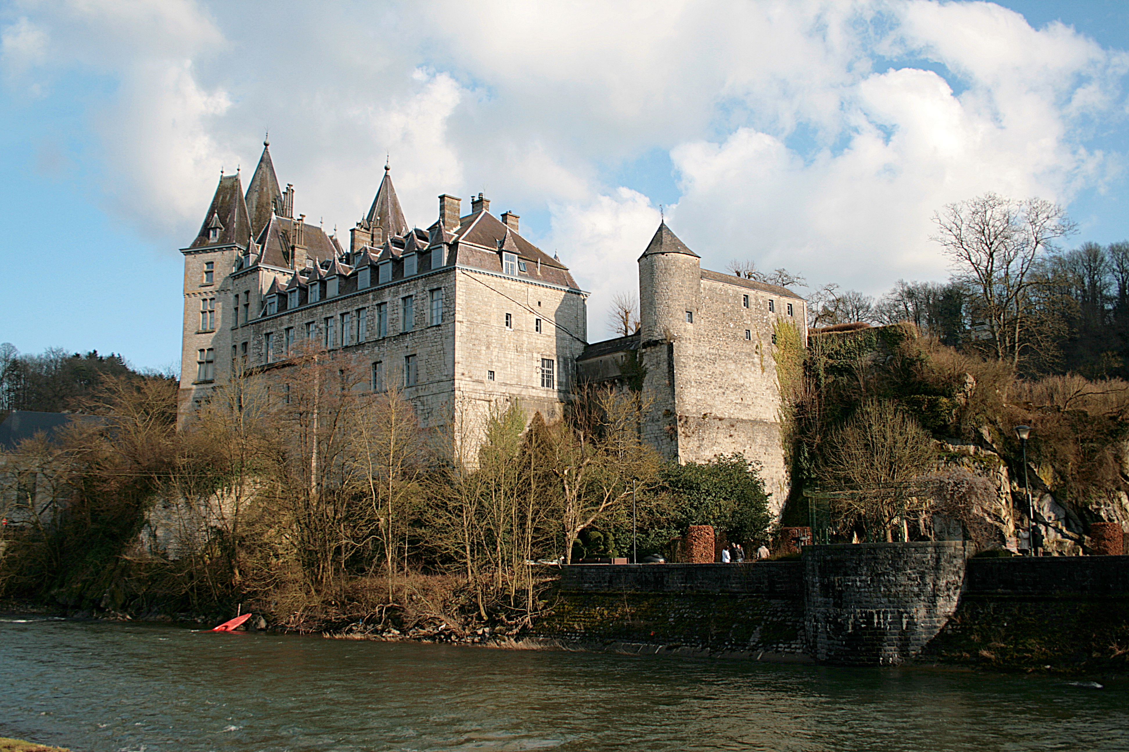 Château des comtes d'Ursel et anciennes murailles d'enceinte de la ville de Durbuy